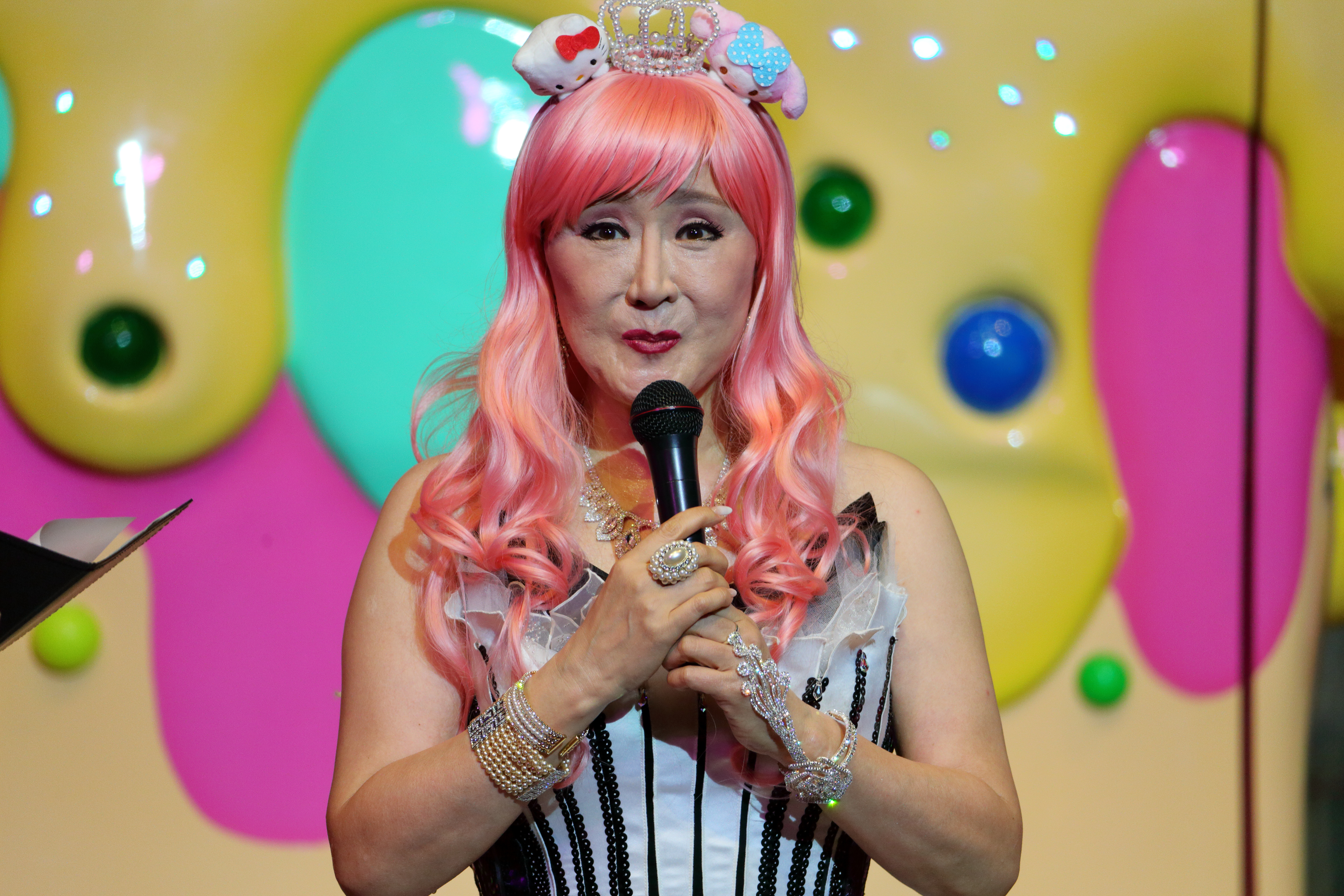 小林幸子スペシャルパレード『音楽の女王様がやってきた』